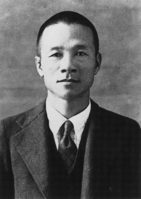 中文（台灣）: 農民運動家 簡吉